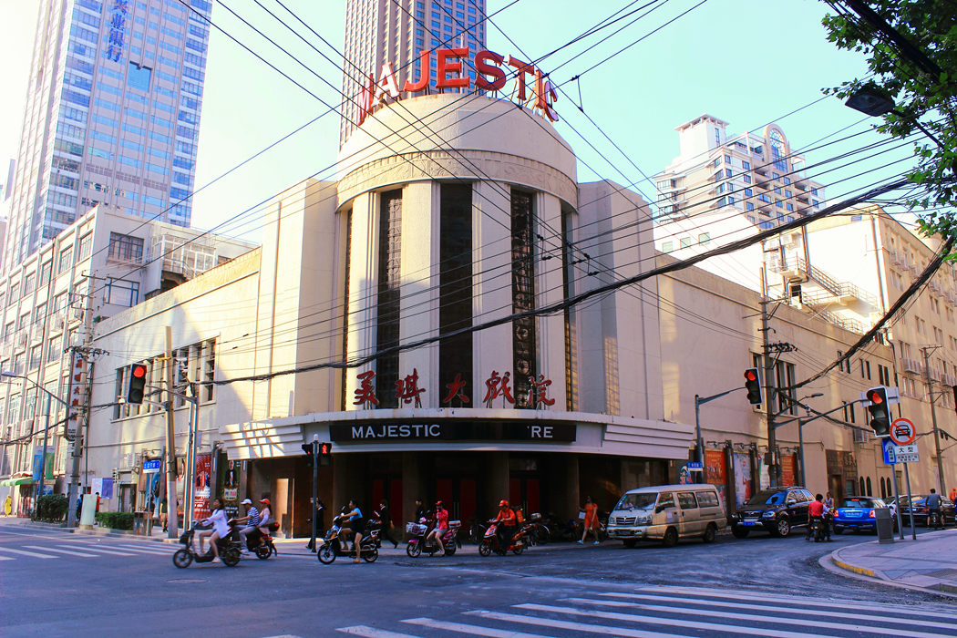 中文（中国大陆）: 美琪大戏院正立面（江宁路东侧）